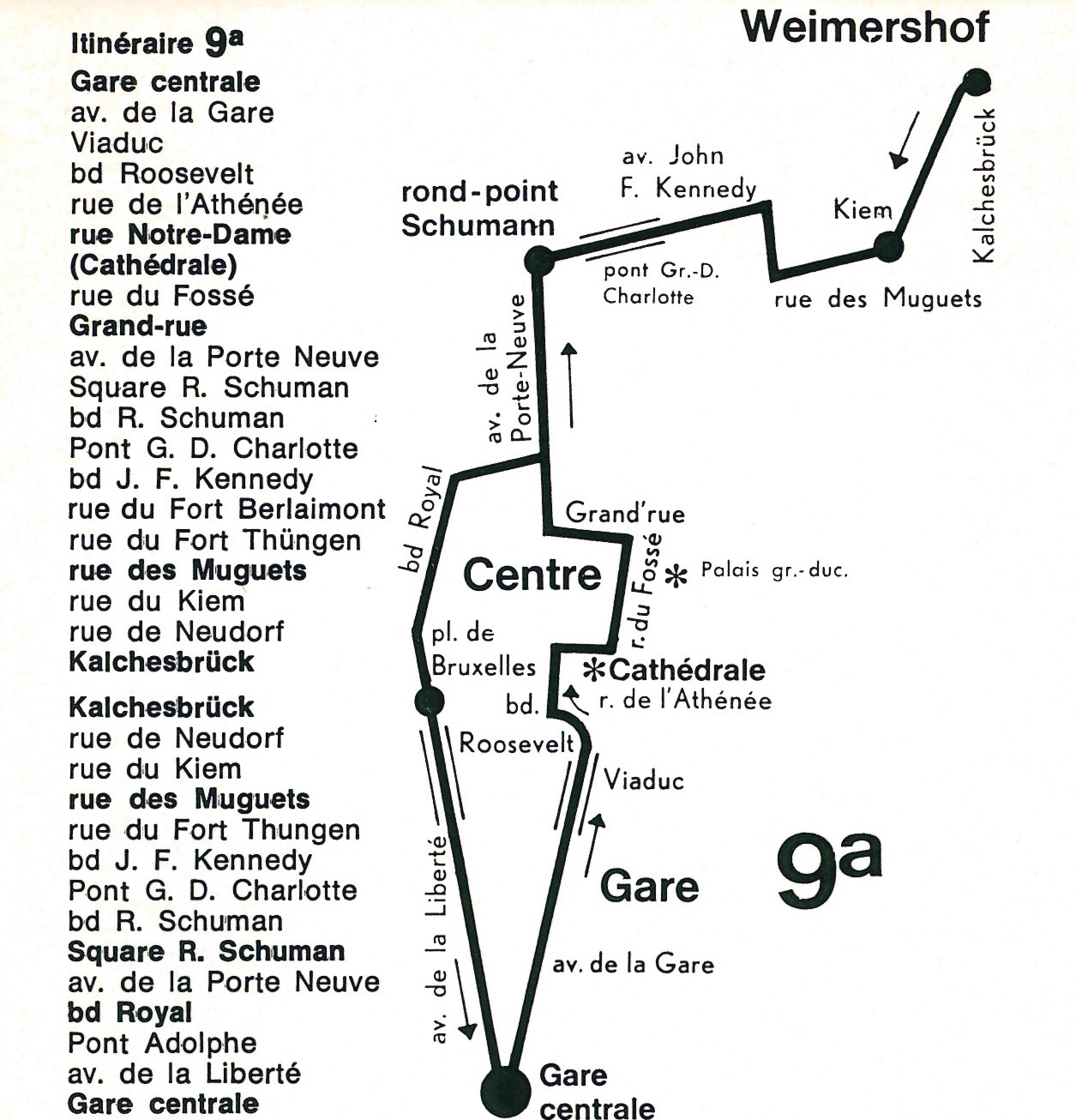 Streck vun der AVL-Linn 9A (1973)